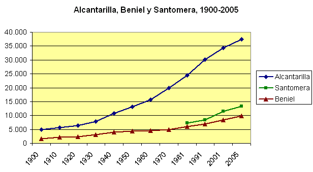 Evolución demográfica de Alcantarilla en el contexto de los municipios de la Huerta de Murcia (excluida la capital) The population of the municipalities of the "Huerta de Murcia" region, Spain, (1900-2005), except for the city of Murcia itself: Alcantarilla, Beniel and Santomera. Own work, given to PD. Source: Instituto Nacional de Estadística